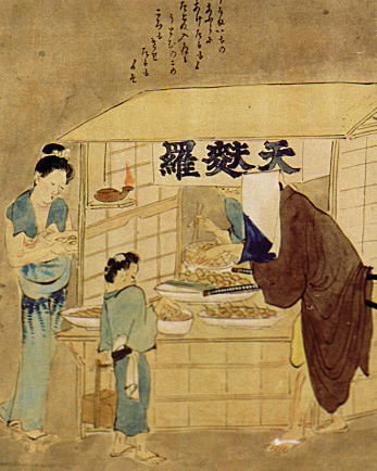 江戸時代の天ぷら屋台。鍬形恵斎 「近世職人尽絵巻」（東京国立博物館蔵）